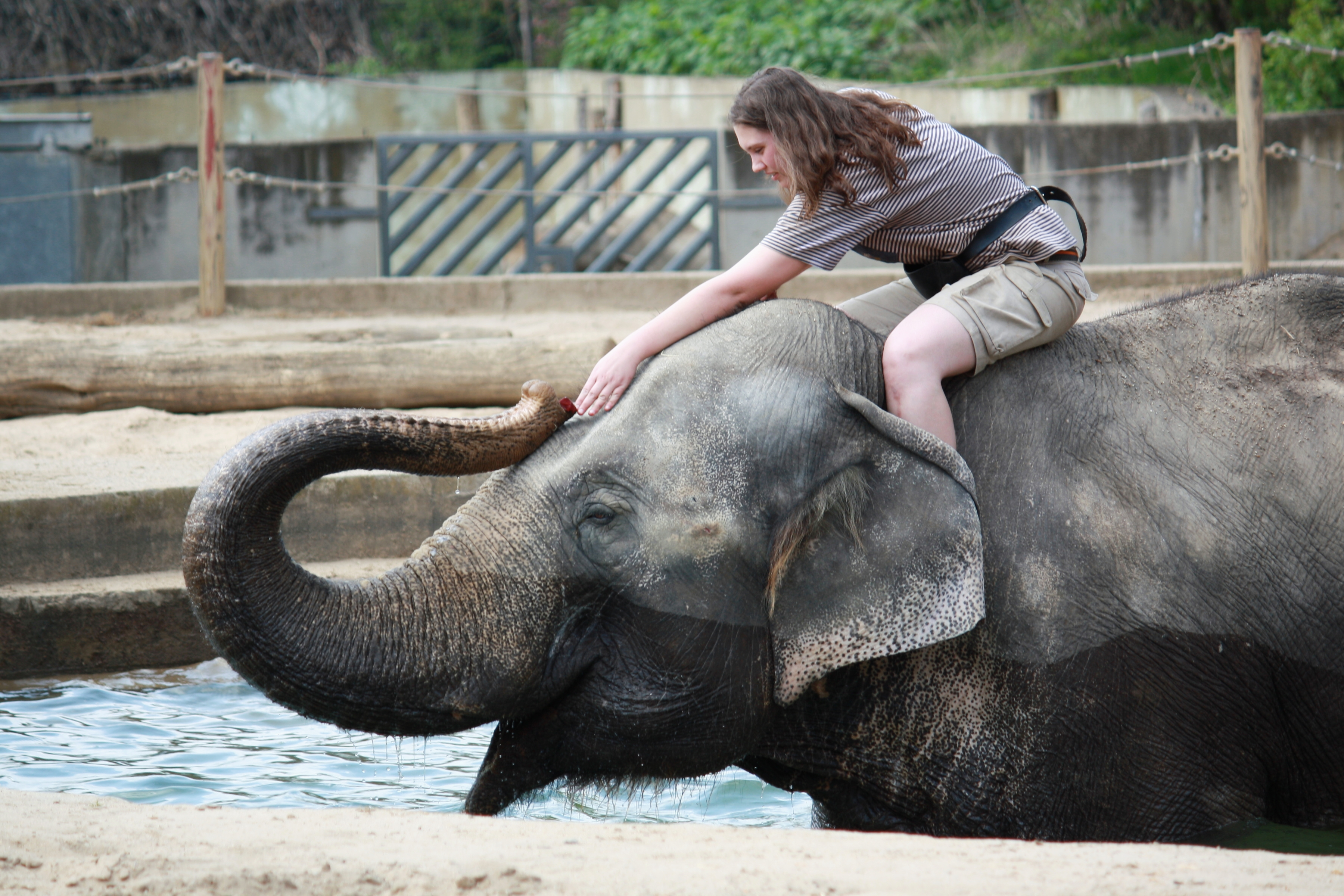 Zoo Praha